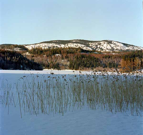 Kalottberg. Ingår i Höga Kustens världsarvsområde. Motiv: Vedasjön Nyckelord: Vintermotiv, Världsarv Kategori: SkogslandskapKalottberg. Ingår i Höga Kustens världsarvsområde.